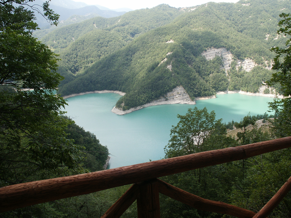 Lago di Ridracoli, comune di Santa Sofia, Emilia Romagna, Italia